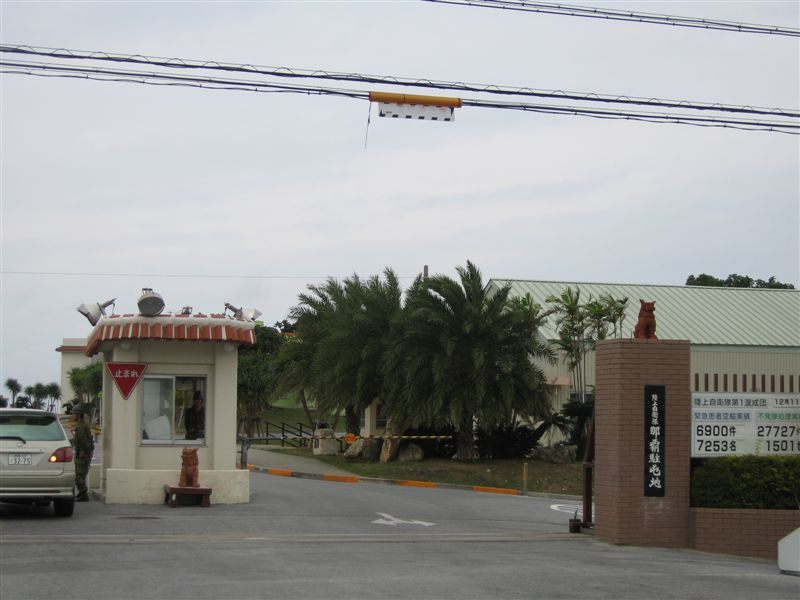 陸上自衛隊 那覇駐屯地[1]入口（沖縄県那覇市字鏡水679、沖縄都市モノレール線「ゆいレール」那覇空港駅最寄り）